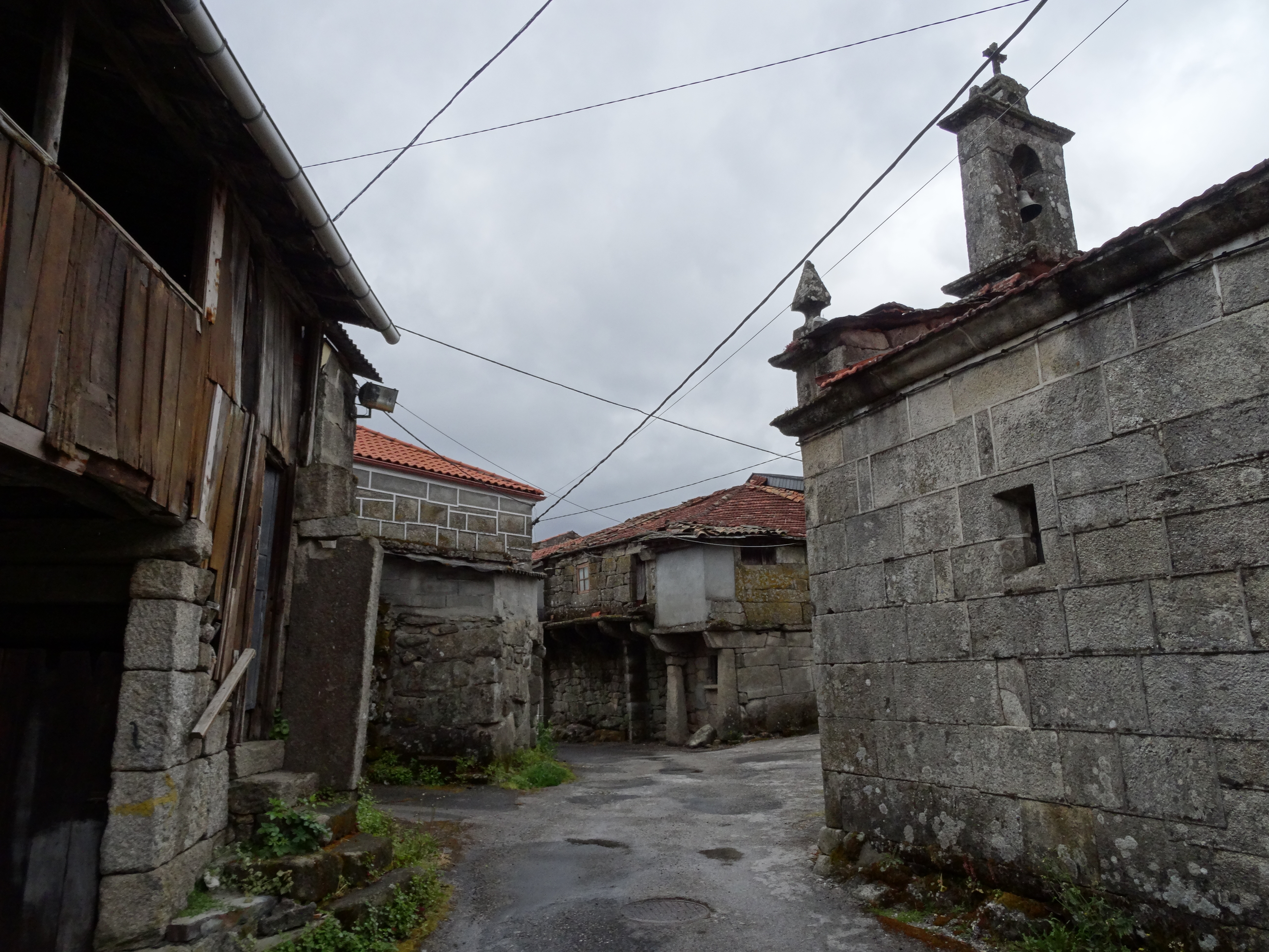 Ver título.